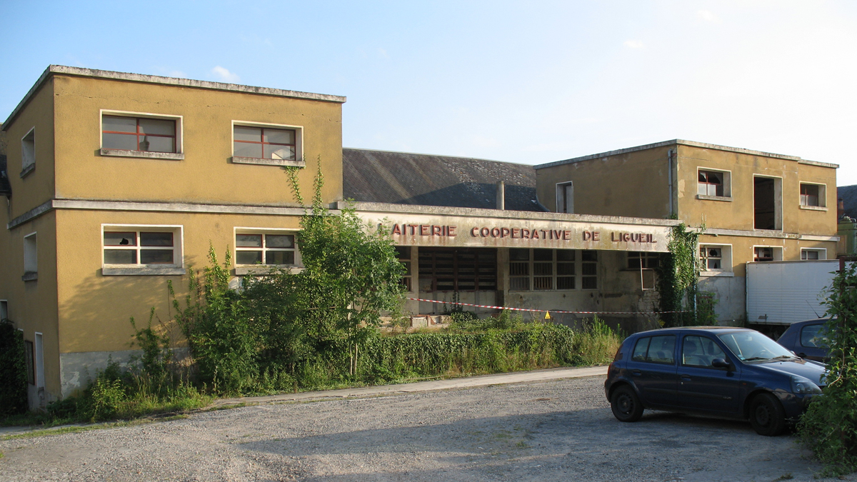 Ancienne laiterie coopérative de Ligueil, Indre-et-Loire, France